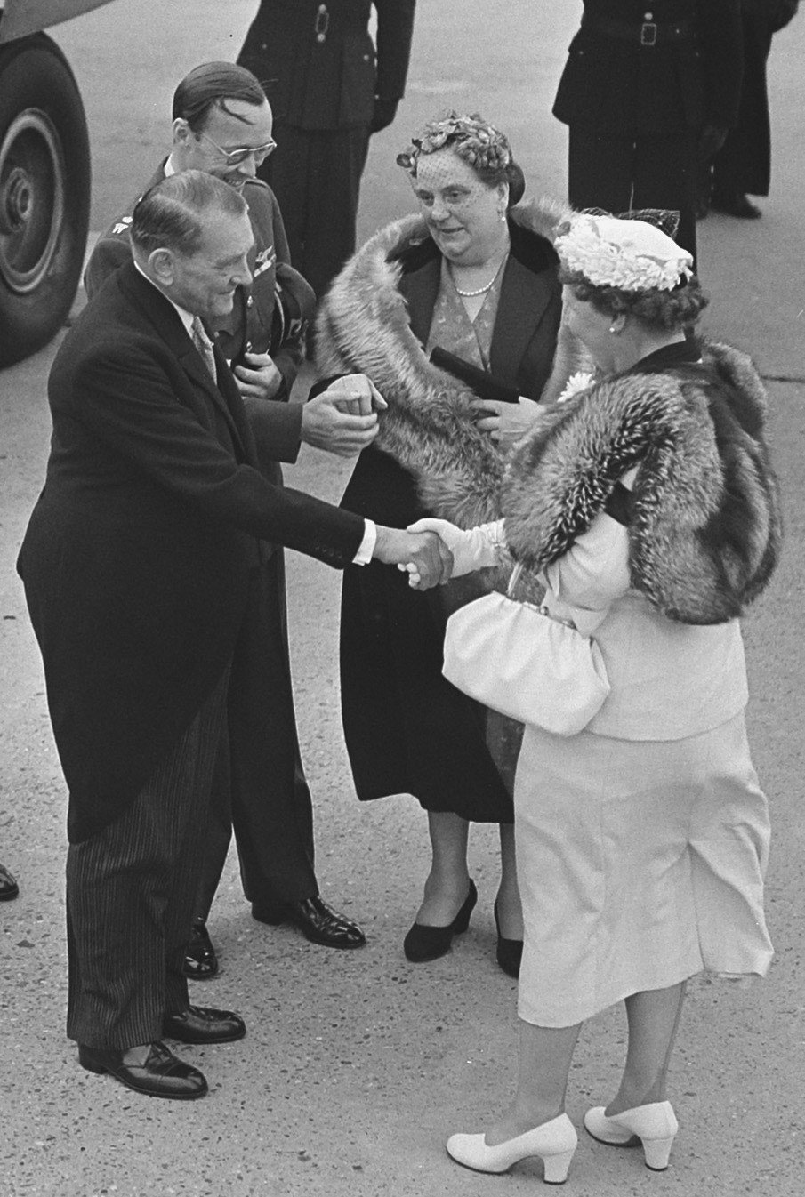 Collectie / Archief : Fotocollectie Anefo Reportage / Serie : [ onbekend ] Beschrijving : Laatste dag staatsbezoek Franse president Coty aan Nederland. Vertrek en afscheid Schiphol Datum : 24 juli 1954 Locatie : Noord-Holland, Schiphol Trefwoorden : koninginnen, koninklijk huis, presidenten, prinsen, staatsbezoeken Persoonsnaam : Bernhard, prins, Coty, R., Juliana, koningin Fotograaf : Bilsen, Joop van / Anefo Auteursrechthebbende : Nationaal Archief Materiaalsoort : Glasnegatief Nummer archiefinventaris : bekijk toegang 2.24.01.09 Bestanddeelnummer : 906-6218